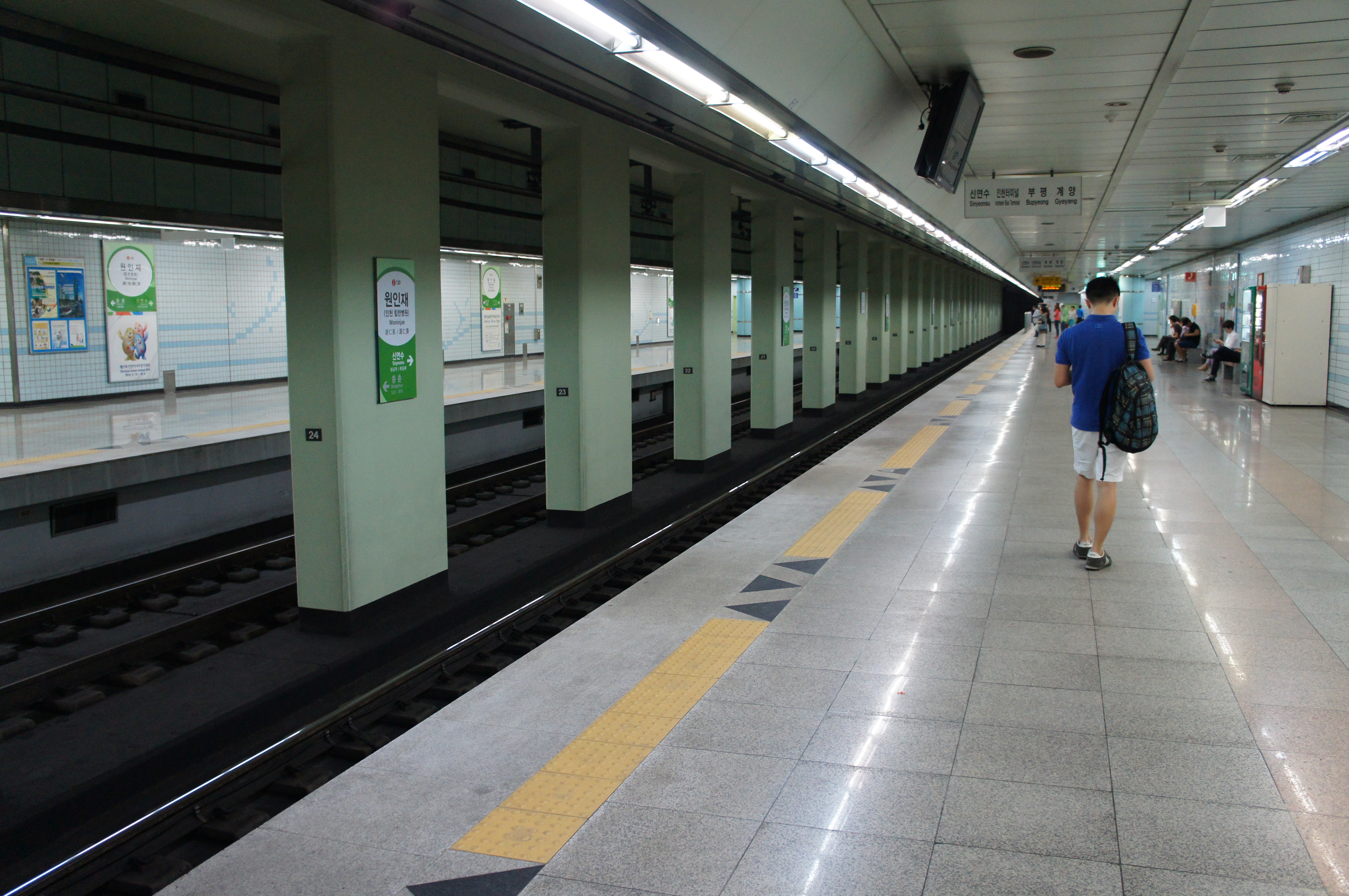 원인재역 역명판